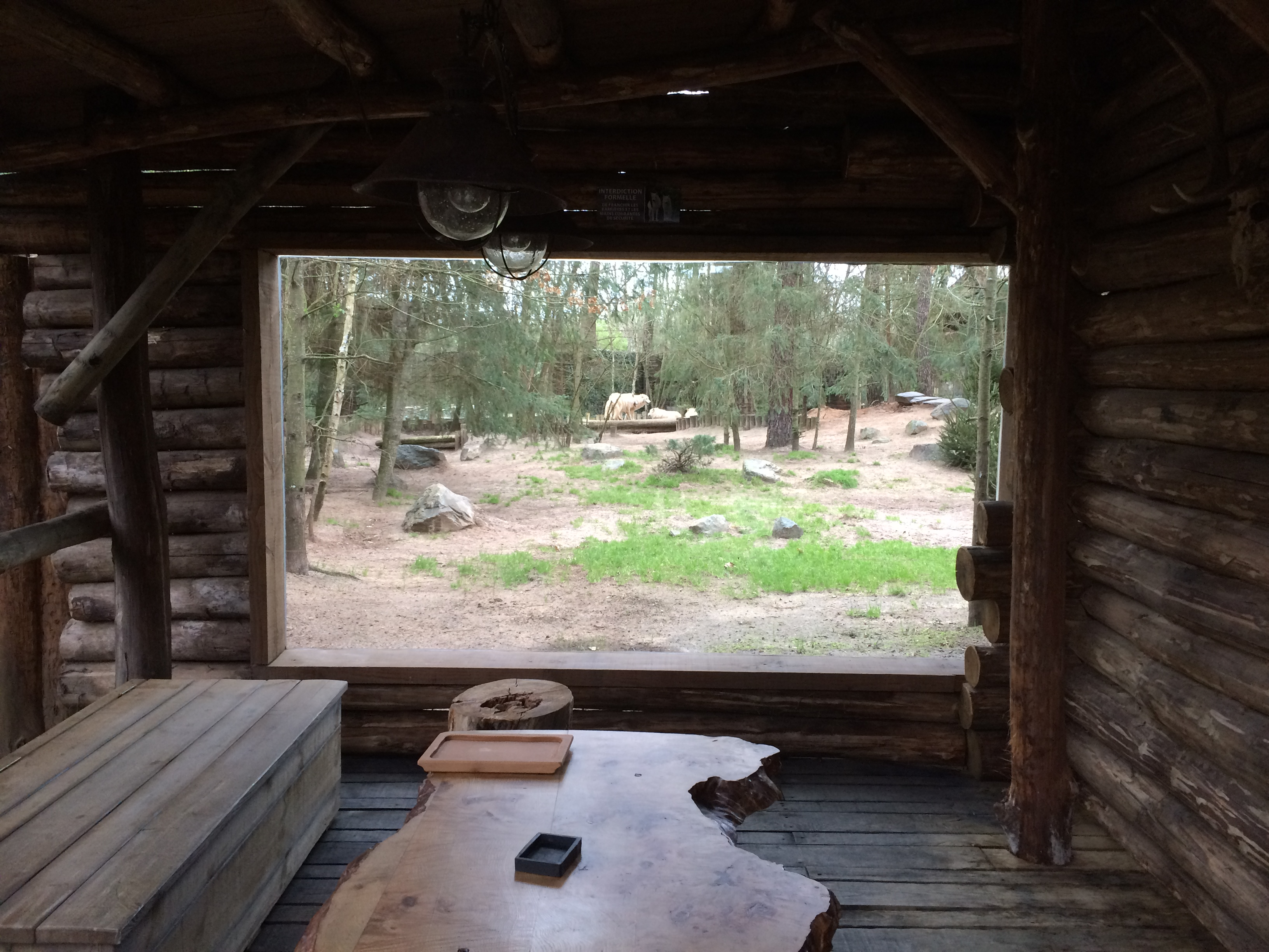 Vue des loups depuis la pergola du lodge Alaska du zoo de la flèche